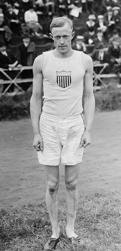 29-8-20, Colombes, [portrait de Floyd] Smart, gagnant du 400 m haies : [photographie de presse] / [Agence Rol]